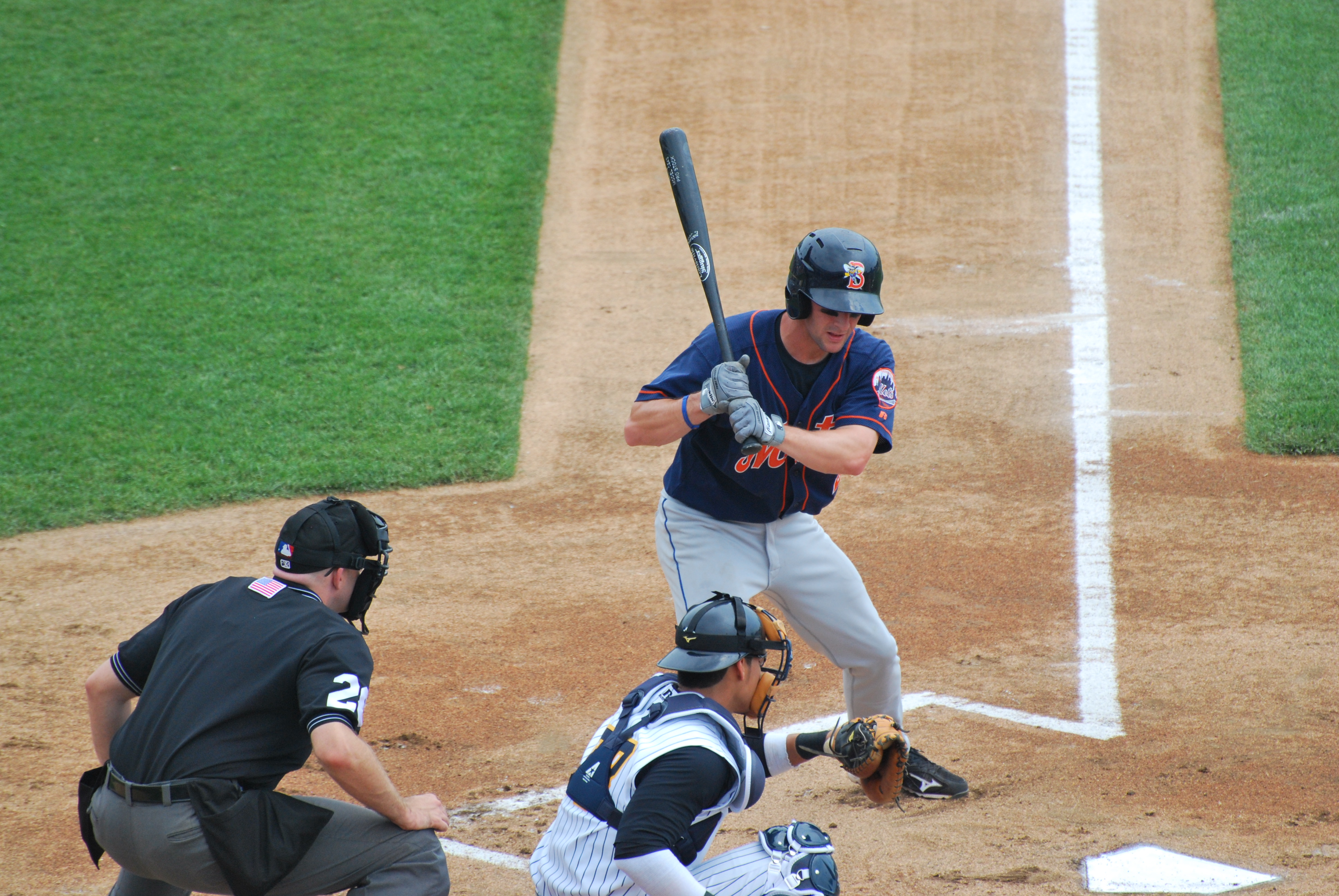 Jonathan Malo